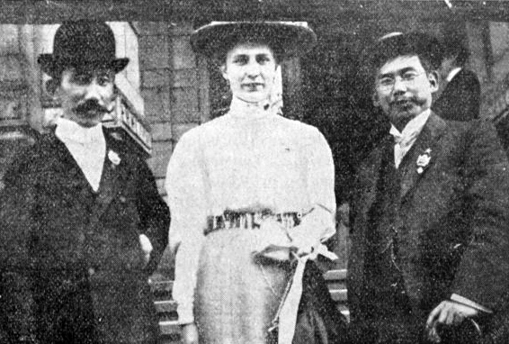 Esperantistoj dum UK 1908 en Dresdeno. D-roj Ŝimura (oficiala delegito de la ministro de instruado de Japanio) kaj Kuroita Kacumi el Japanio kaj f-ino Paula Grave el Danio.